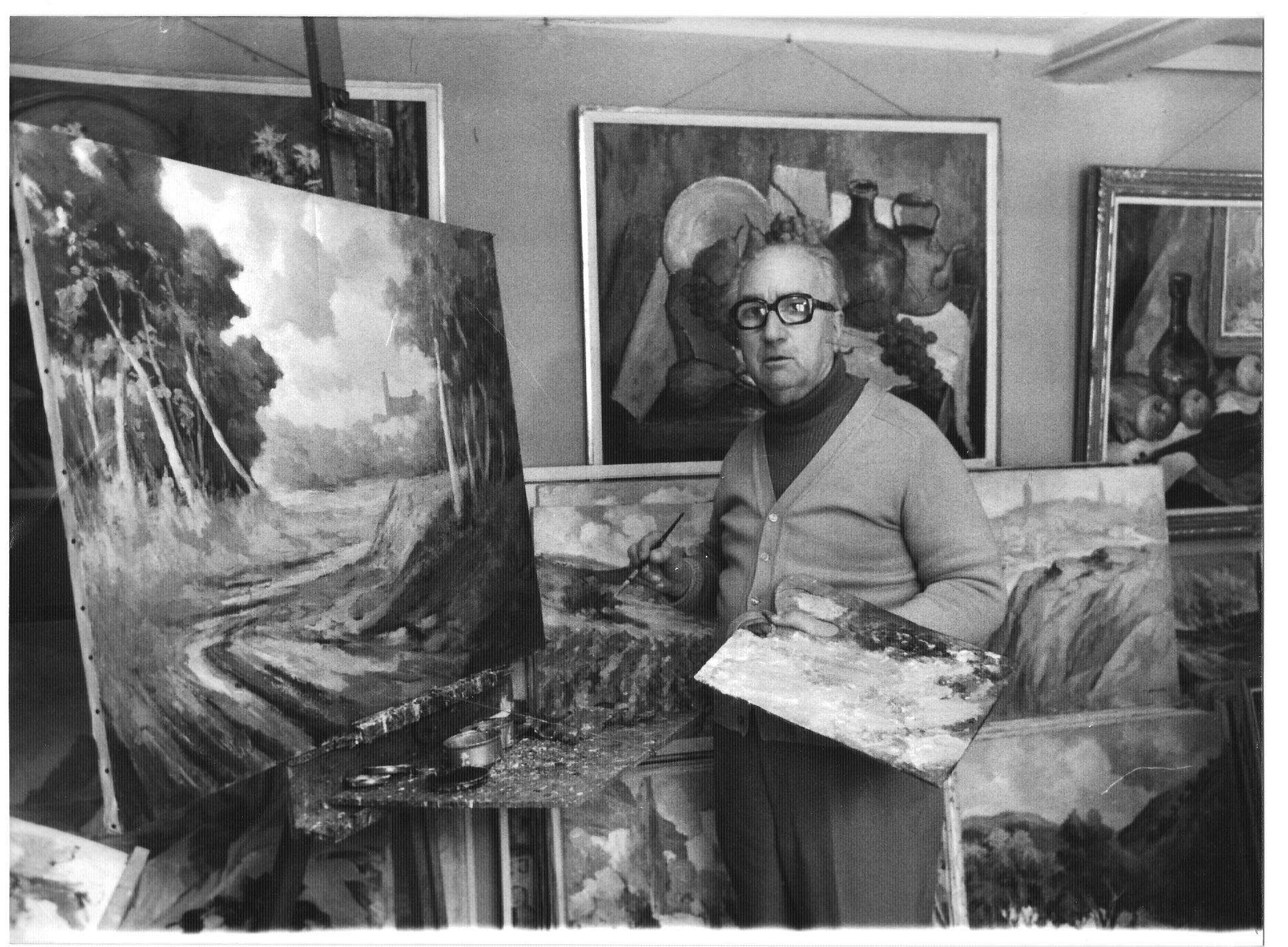 La fotografia muestra al artista Isidre Mercadé Ferrando, pintando en su estudio